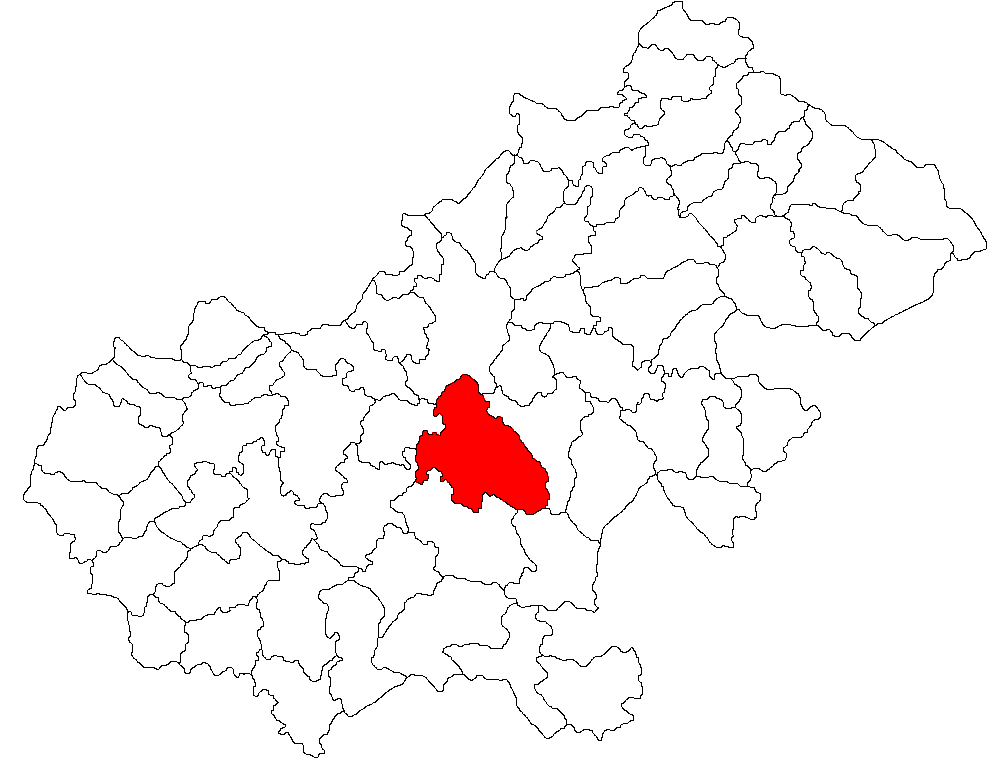 Categorie:Hărţi ale judeţului Satu Mare